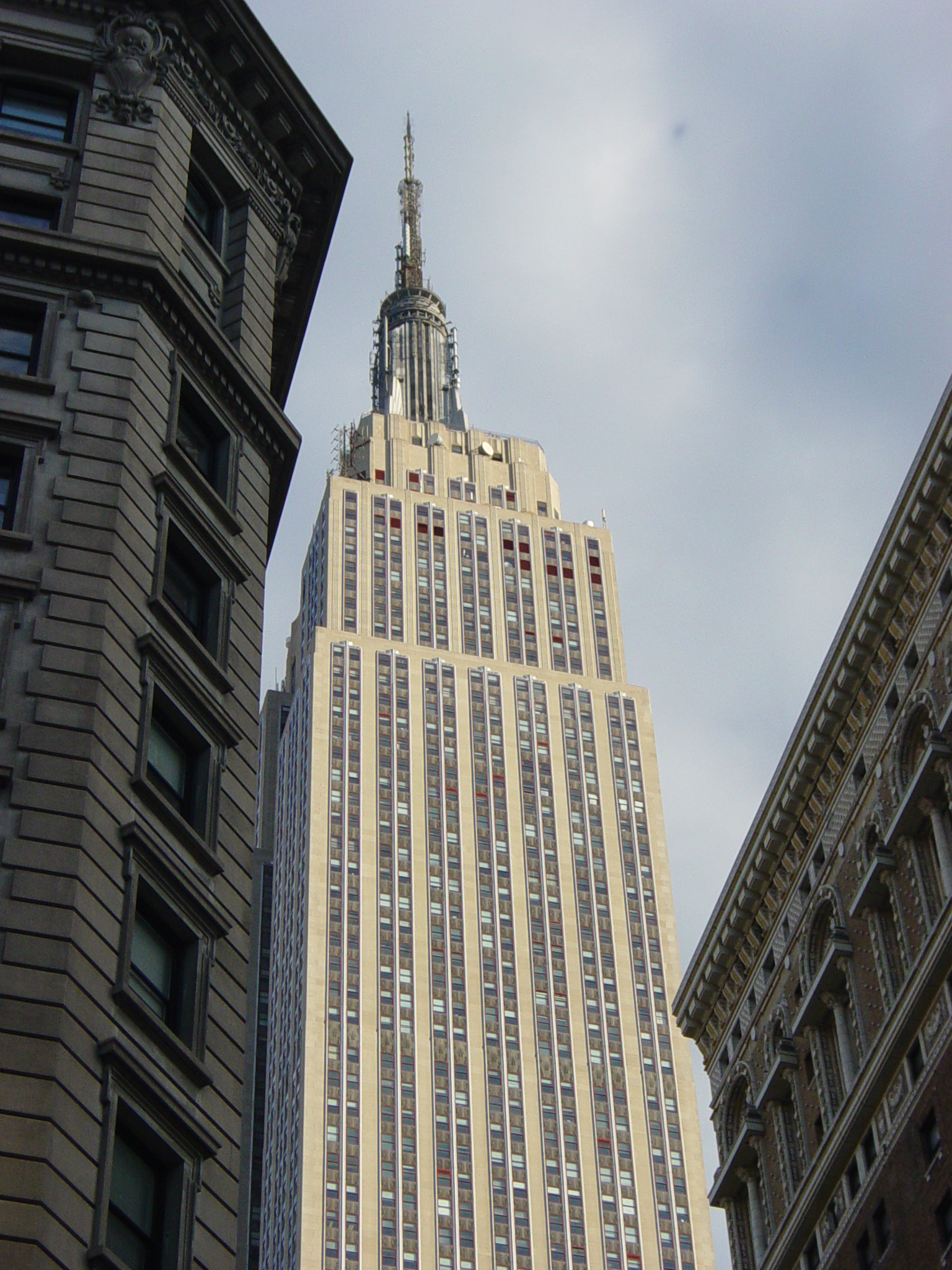 Oberer Teil des Empire State Building.